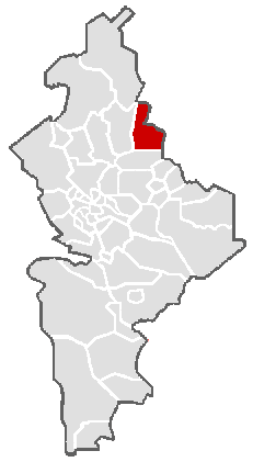 Ubicación geográfica del municipio de Parás en el estado mexicano de Nuevo León.